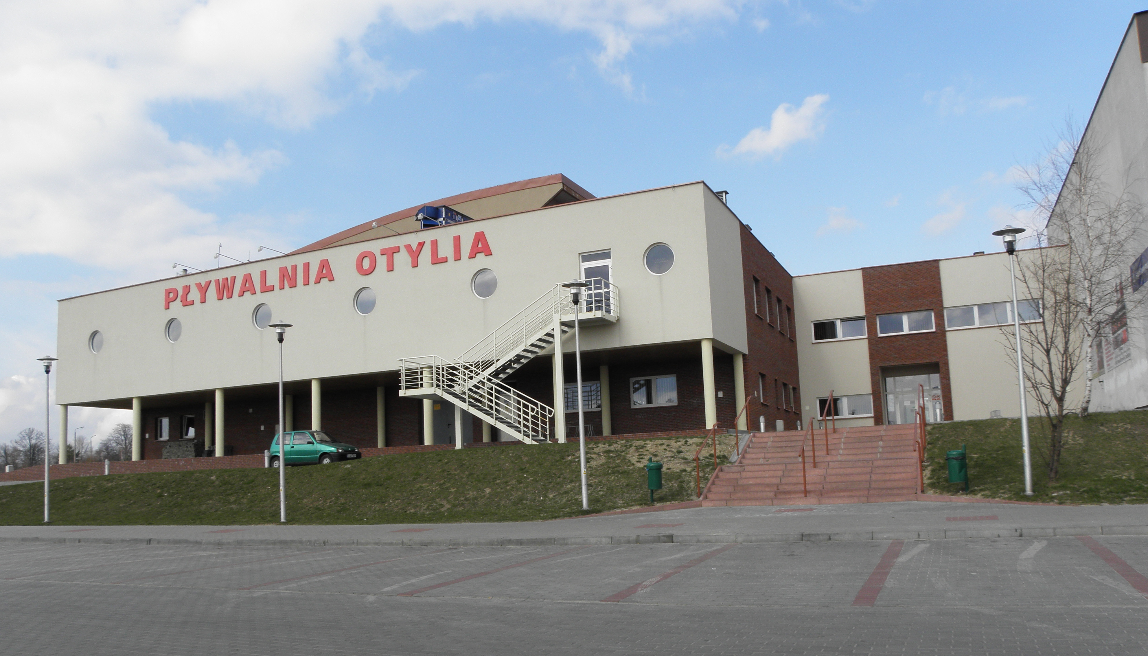 Kryta pływalnia w Janowie Lubelskim